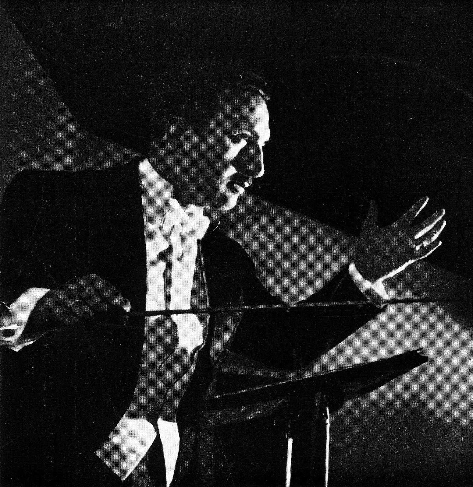 Moisés Davia Soriano (1922-1994)